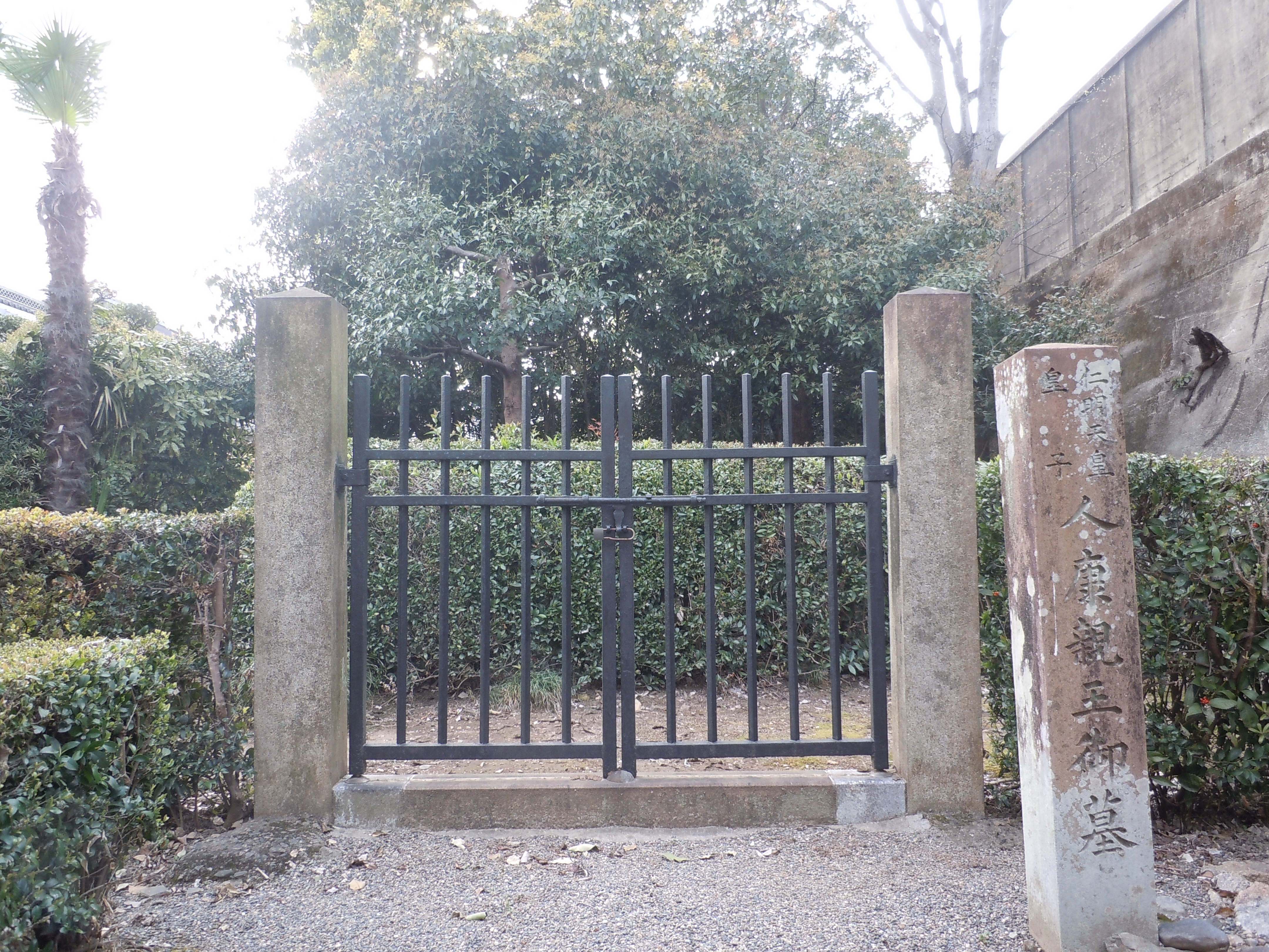 人康親王宮内庁墓。山科区にて。